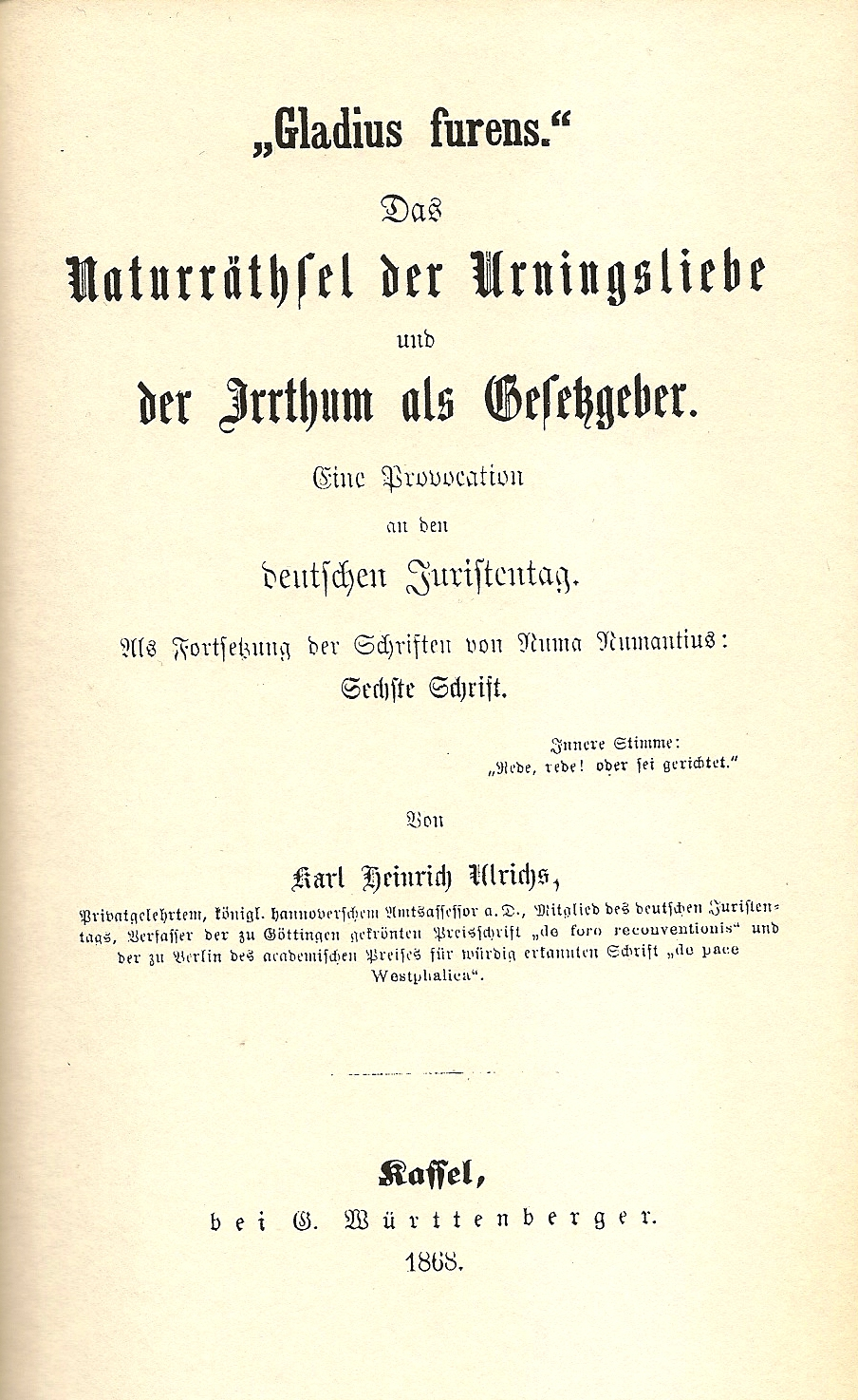 Innentitel der 1868 von dem Sexualwissenschaftler veröffentlichten Schrift von Karl Heinrich Ulrichs Gladius furens. Das Naturräthsel der Urningsliebe und der Irrthum als Gesetzgeber. Eine Provokation an den deutschen Juristentag. Als Fortsetzung der Schriften von Numa Numantius: Sechste Schrift. Innere Stimme: "Rede, rede! oder sei gerichtet." Von Karl Heinrich Ulrichs, Privatgelehrtem ..., königlich hannoverschen Amtsassessor a.D., Mitglied des deutschen Juristentages, Verfasser der zu Göttingen gekrönten Preisschrift "de foro reconventionis" und der zu Berlin des academischen Preises für würdig erkannten Schrift "de pace Westphalica". Erschienen 1868 in Kassel bei G. Württenberger ...